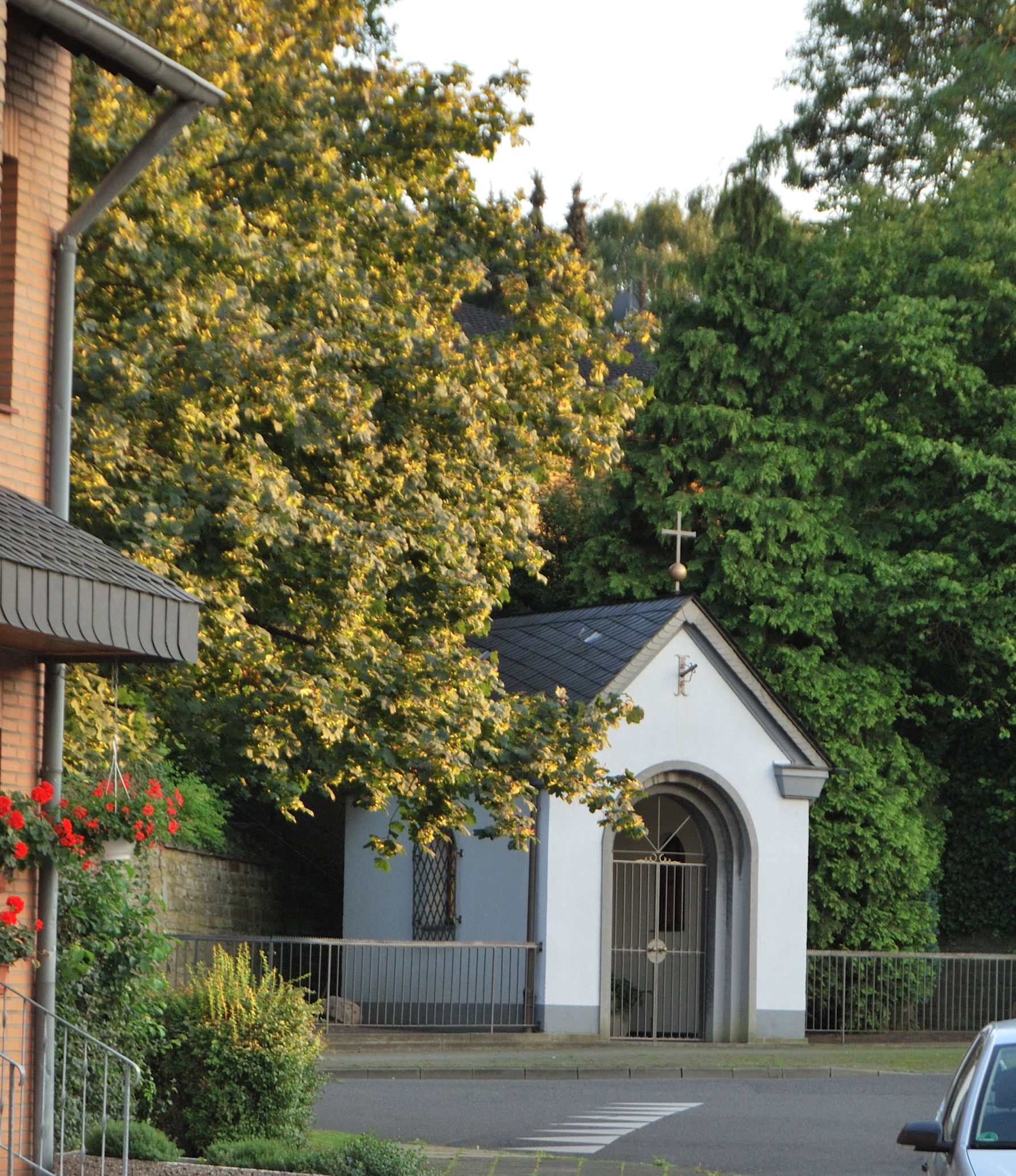 Alpenstraße/Ecke FortunastraßeThis is a photograph of an architectural monument.